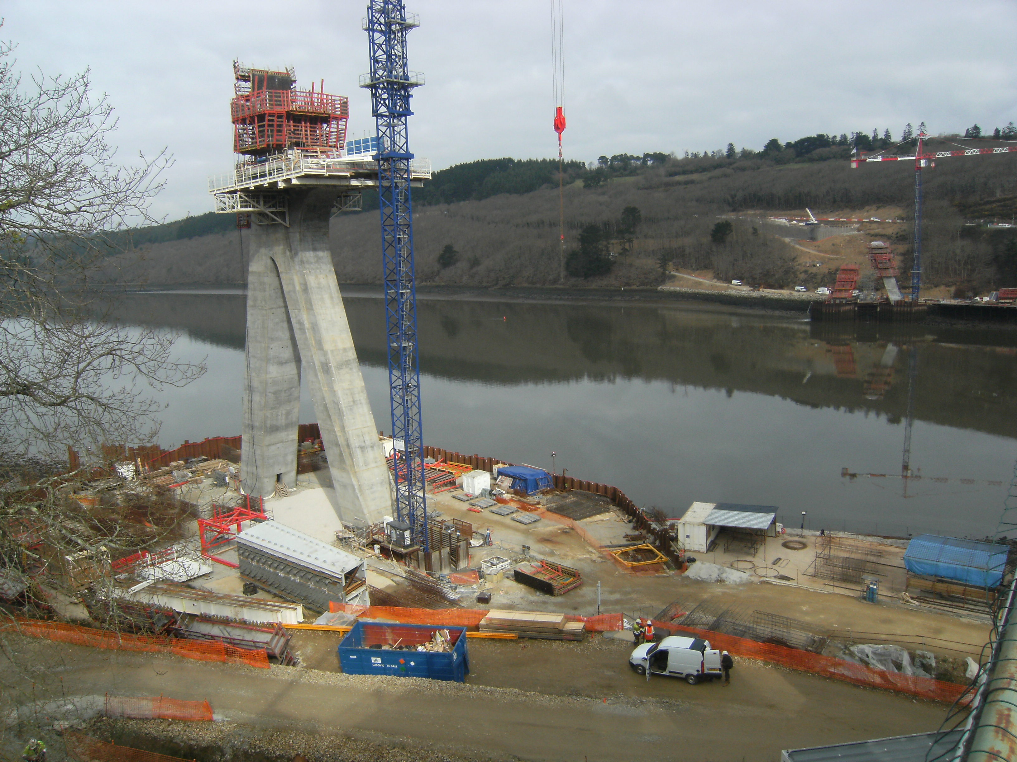 Pont de Térénez en reconstruction, vu de la rive gauche. (France - Finistère (29)